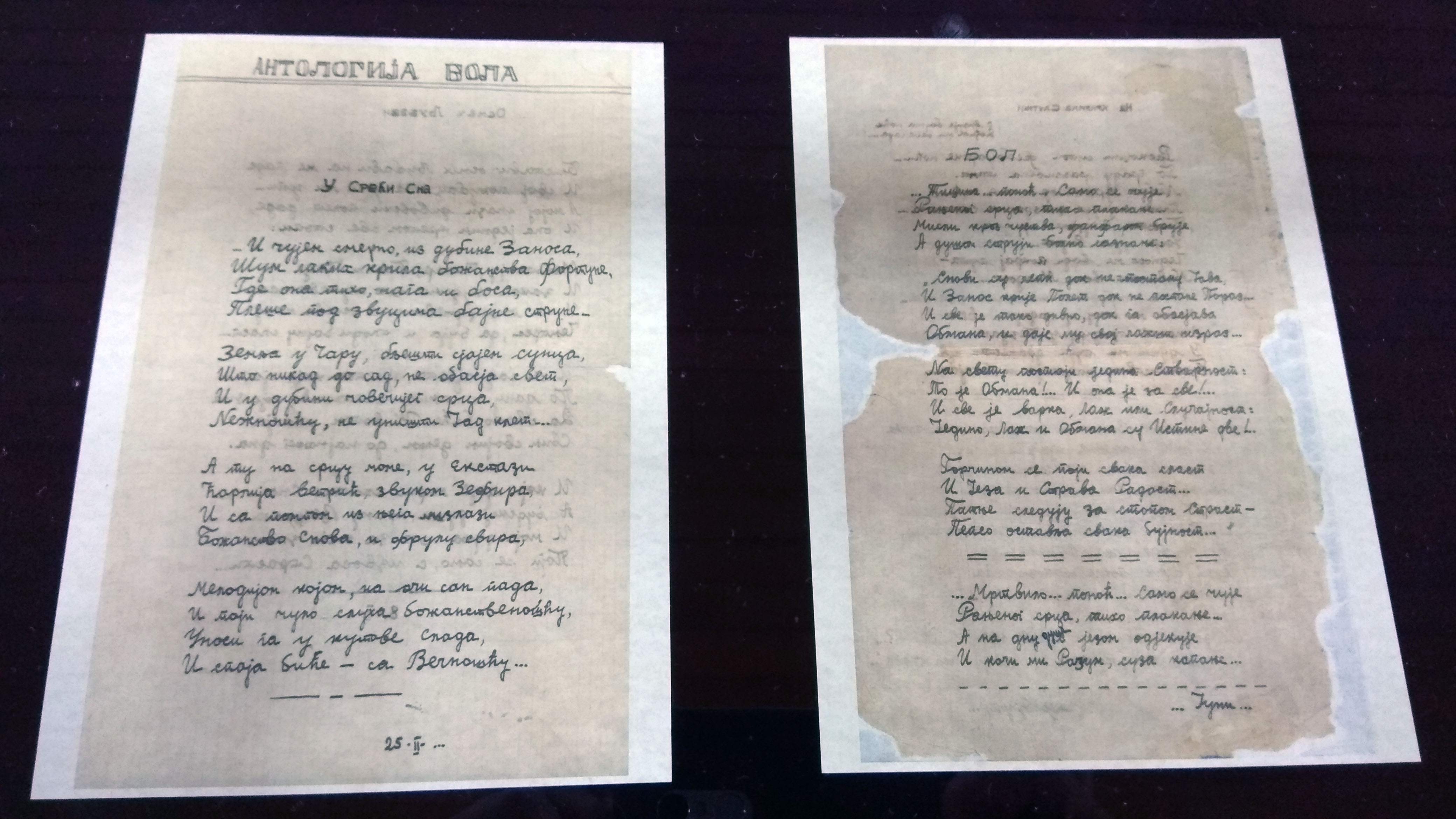 Оргиналниот ракопис од збирката „Антологија на болката“ од Кочо Рацин